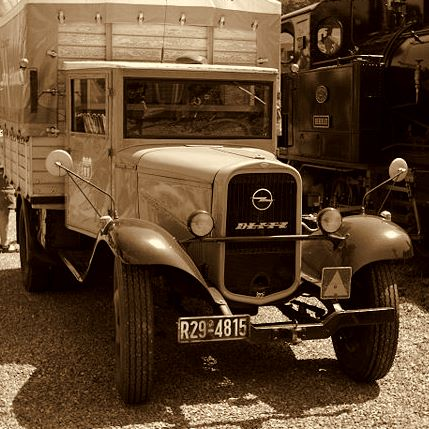 eine der ersten "Opel Blitz" LKW-Typen